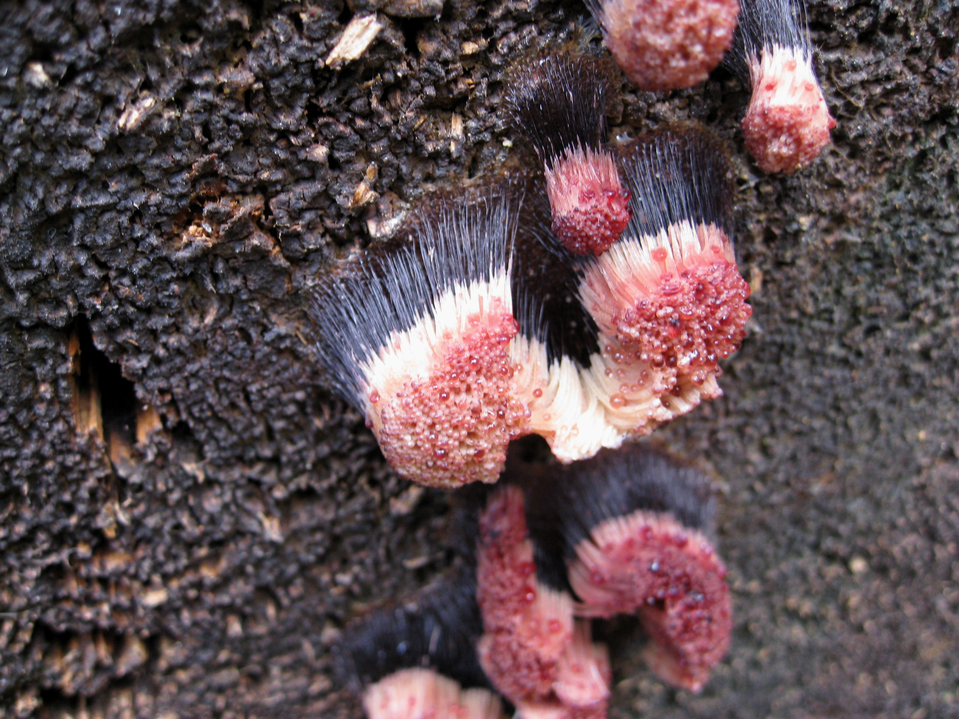 Domain: Eukaryota Kingdom: Amoebozoa Phylum: Mycetozoa i080908 095